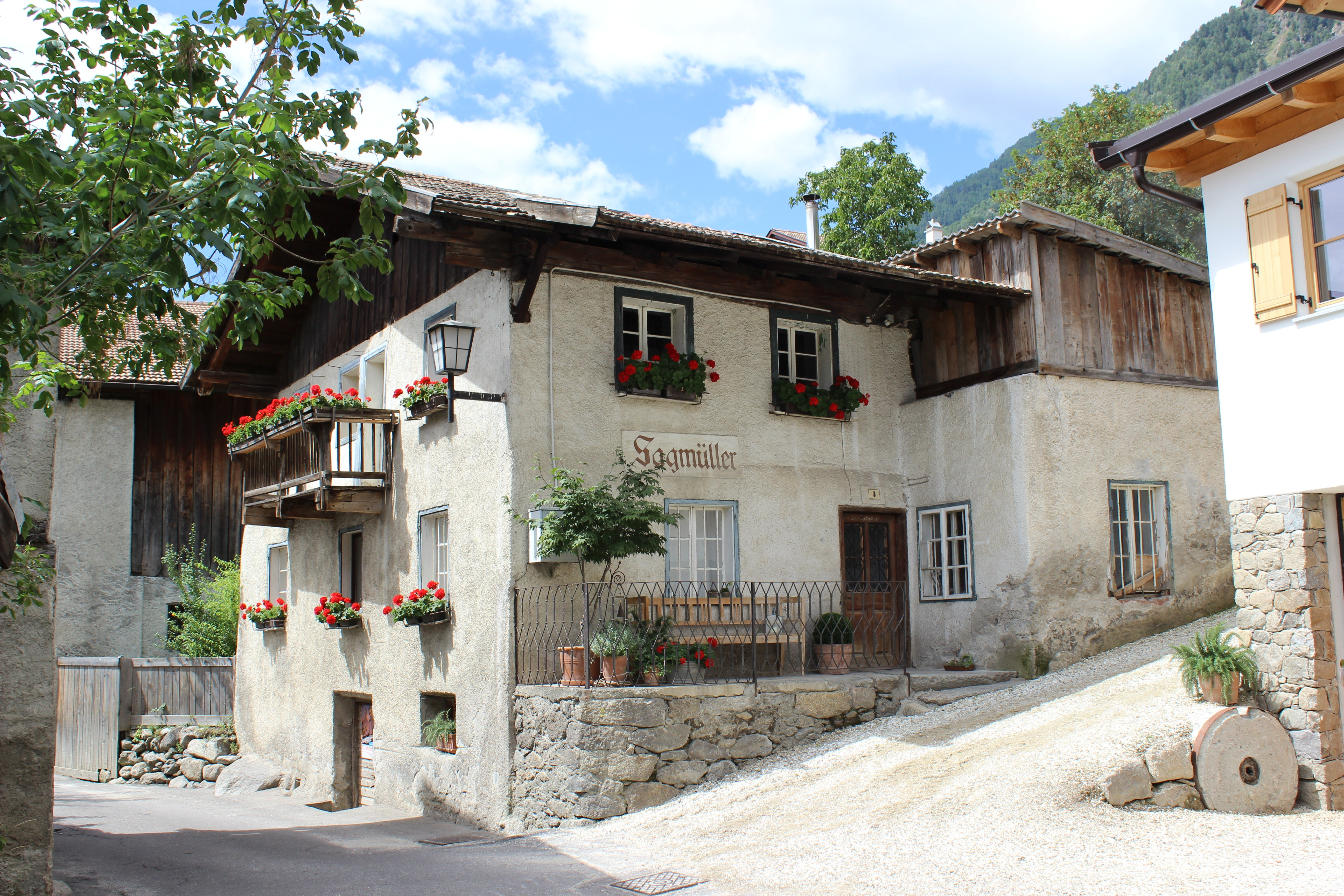 Sagmüller in Partschins